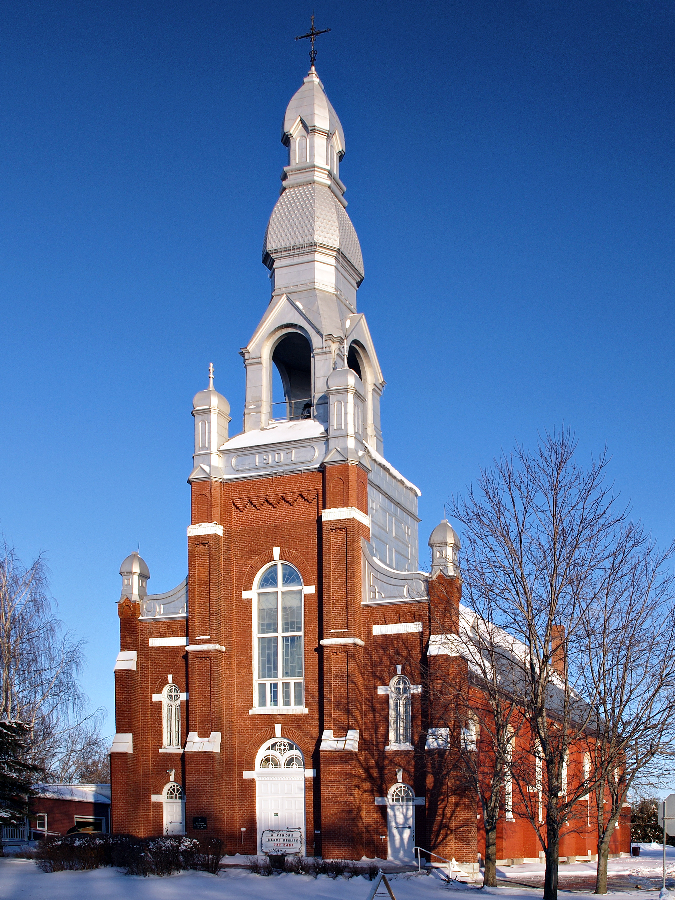 St-Pierre-de-Véronne-à-Pike-River - Avant Eglise St-Pierre-de-Vérone